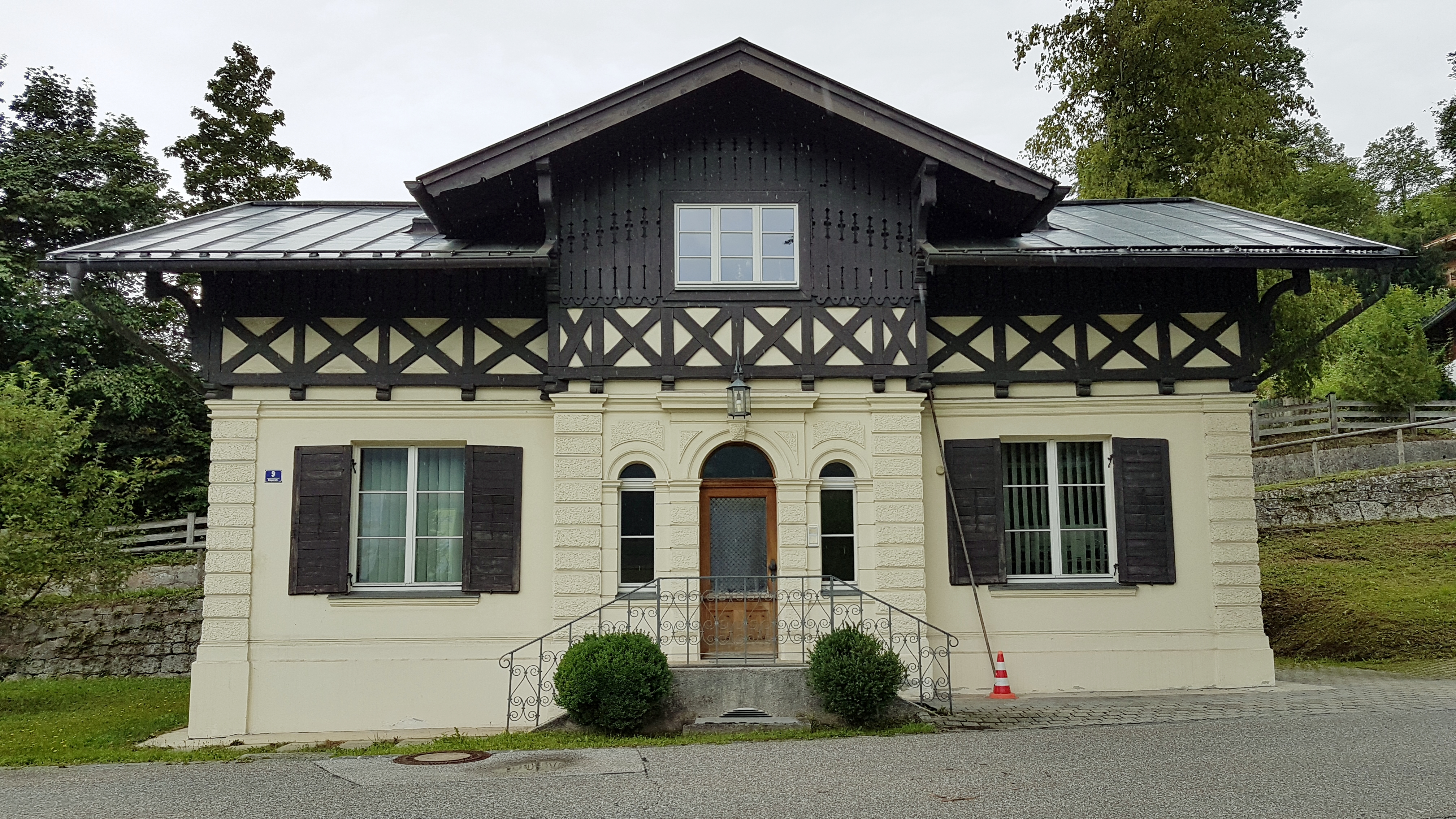 Villa Bayer (Berchtesgaden)